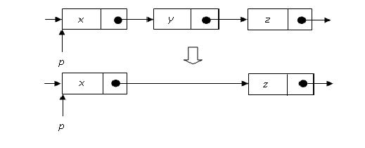 Brisanje liste